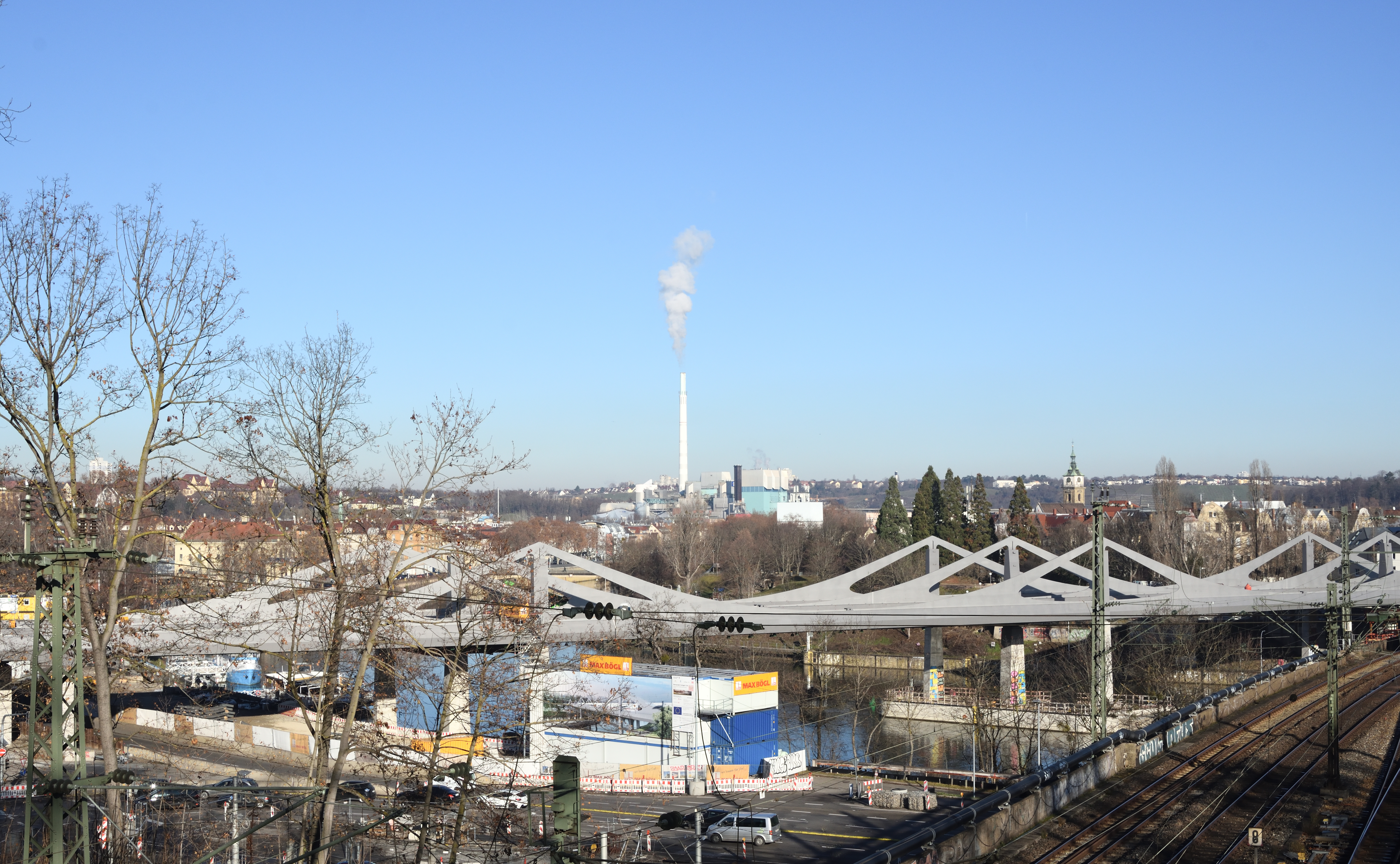 Stuttgart 21, neue Neckarbrücke Brücke Bad Cannstatt